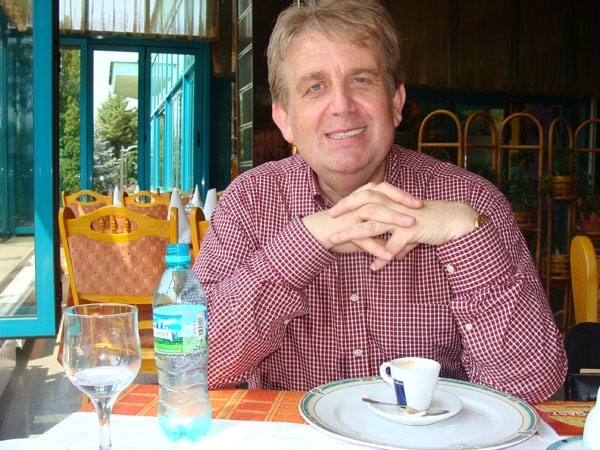 George Achim